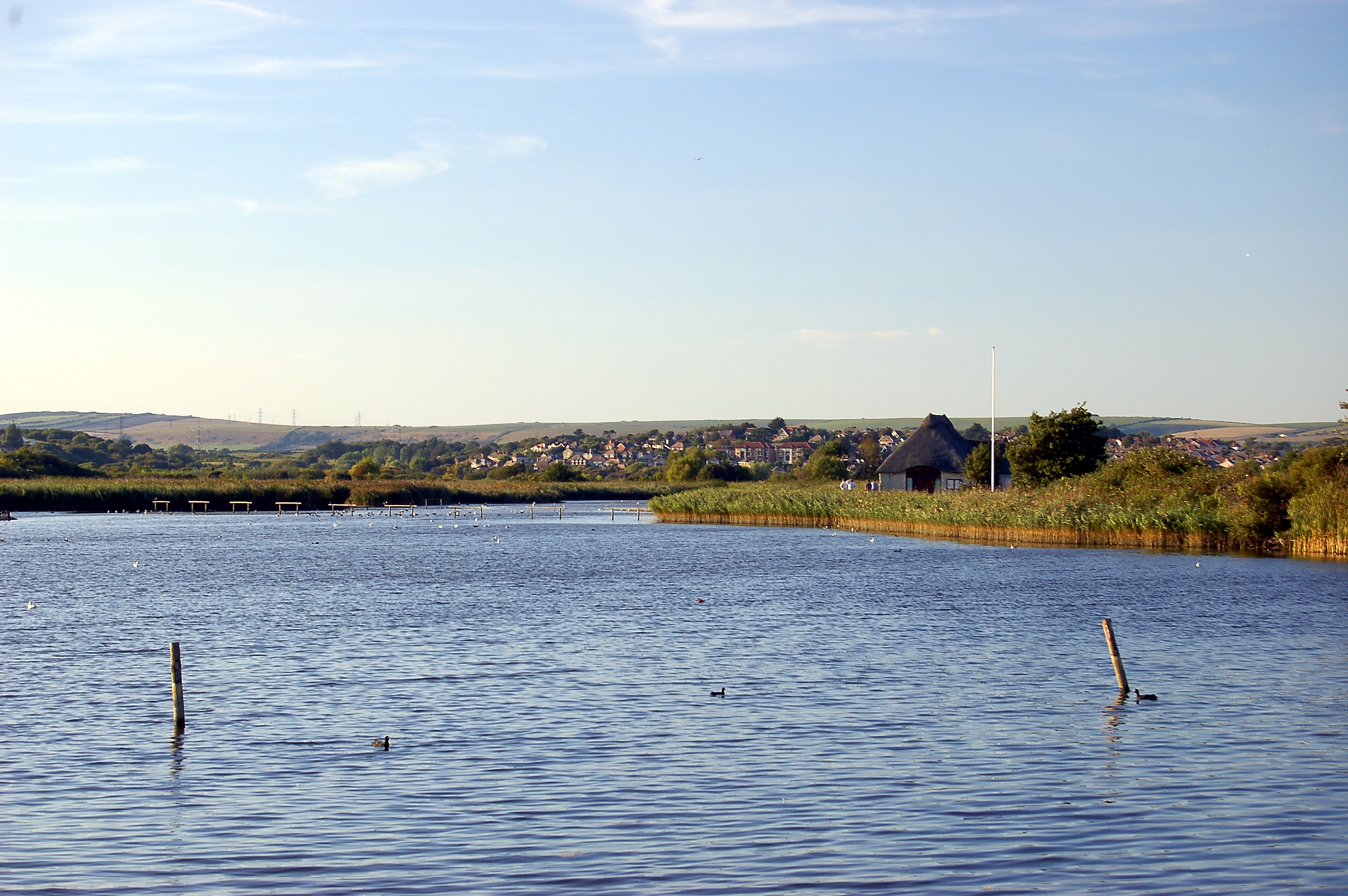 Radipole Lake